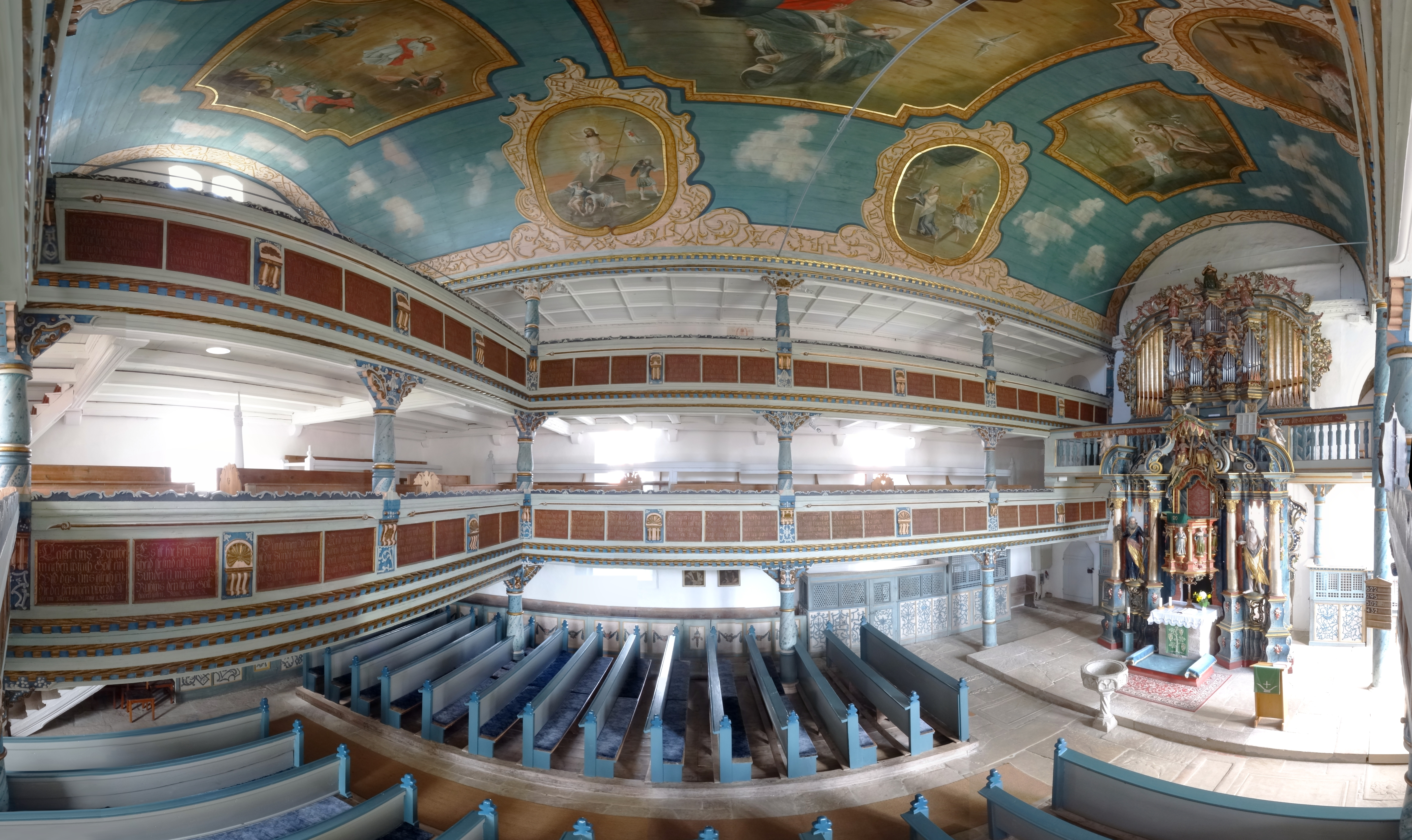 Der barocke Innenraum mit zwei dreiseitigen Emporen und hölzernem Tonnengewölbe wurde 1766 von Johann Jacob Prazzo und Johann Jacob Gehres aus Meiningen mit prächtiger Malerei ausgestaltet.